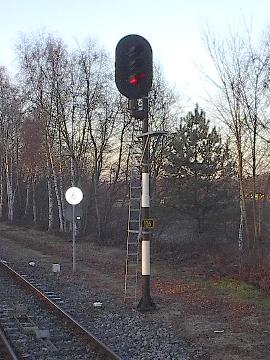 Hoofdsein bij station Raalte, eigen foto